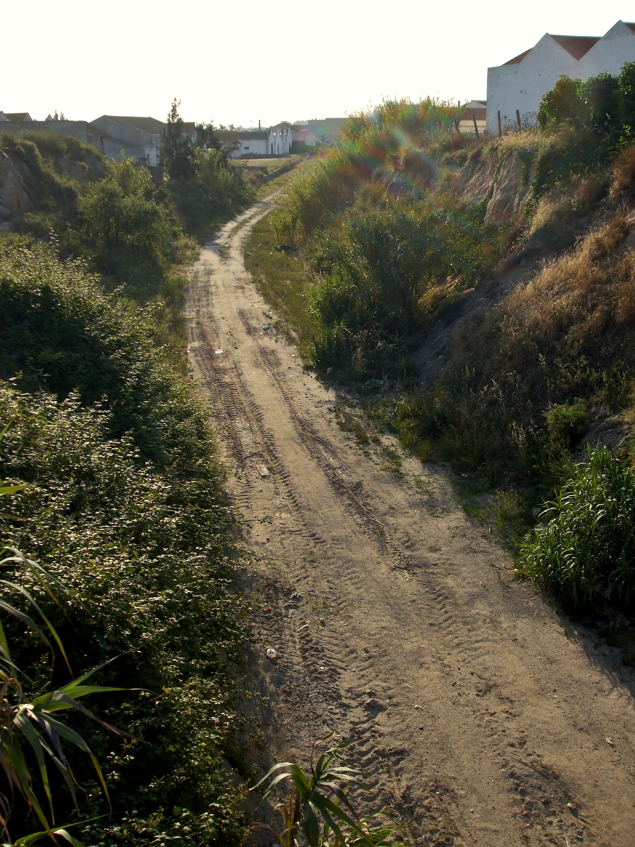 ao fundo, a Estação do Montijo (e o fim do Ramal). Via férrea: Ramal do Montijo [PK 25] Local: Montijo Data e hora: 5 de Maio de 2009 [19h06] Sentido: Montijo